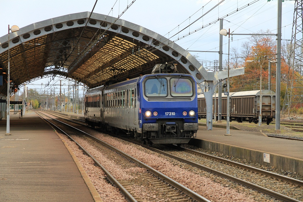 La Z 7310 assurant un train vers Tarbes marque l'arrêt en gare de Lannemezan en novembre 2010, Hautes-Pyrénées, France.